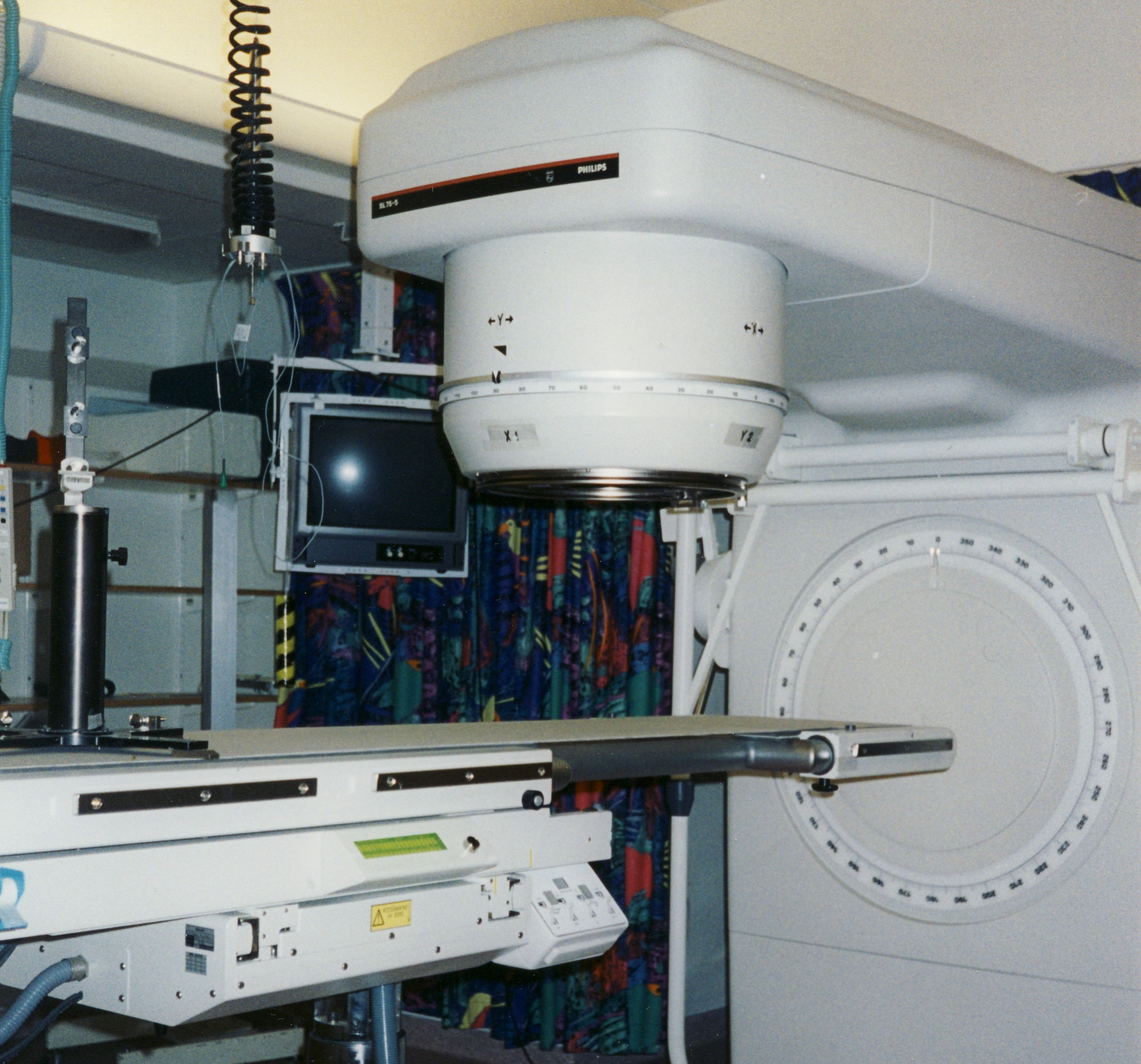 Strålkanon på Radiumhemmet, Solna